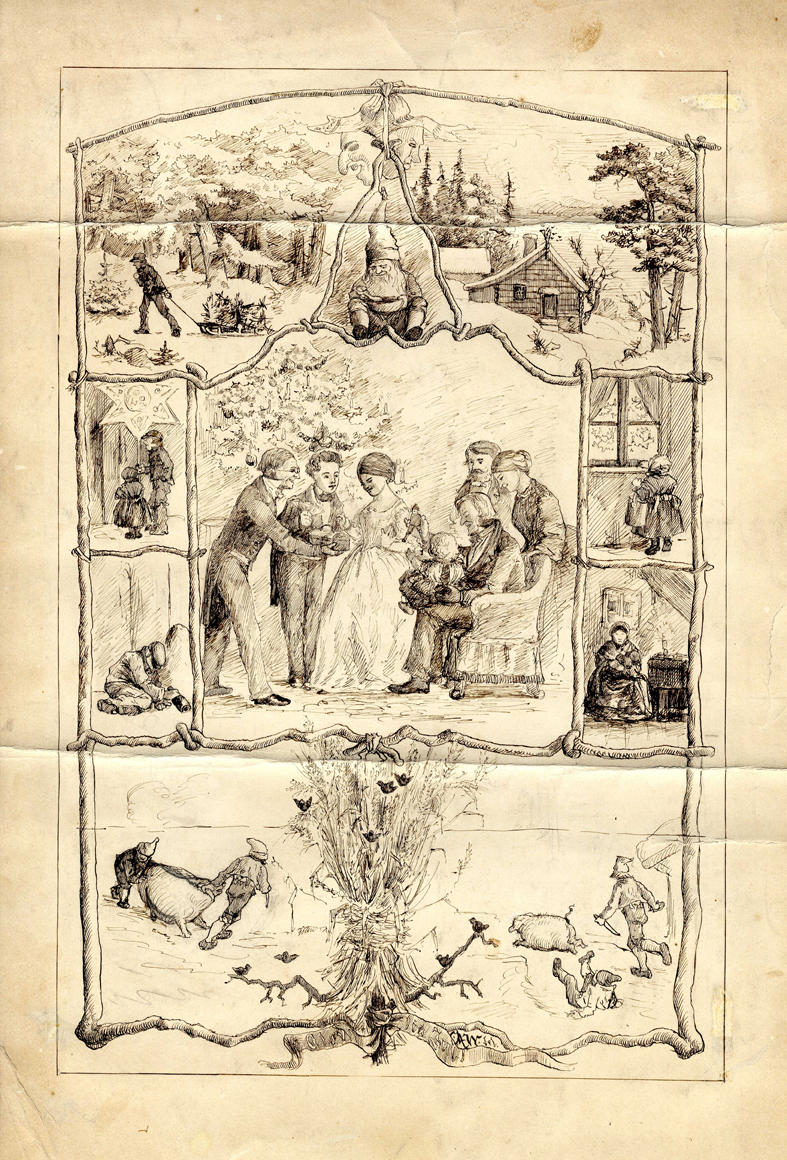 Jul i Norge Luke 24 - selveste julaften - åpnes og der finnes et ganske så flott vitnesbyrd om juletradisjoner så tidlig som i 1866. Pennetegning fra "Illustrert Nyhedsblad" 1866, fra privatarkivet etter Paul Botten-Hansen. Botten-Hansen (1824-1869) var norsk bibliograf og litterat. Han ble født i Gudbrandsdalen og vokste opp i små kår. I 1847 begynte han å studere. Fra 1856 var han assistent i Riksarkivet. Botten-Hansen ble amanuensis ved Universitetsbiblioteket i 1860. Han redigerte i 1851 bladet "Andhrimner" sammen med Ibsen og Vinje og deretter fra 1851 til 1856 "Illustrert Nyhedsblad". Jul i Norge, Pennetegning: Oscar Arnold Wergeland, 47 x 21 cm, Xylograf: Haakon Adelsten Lunde, Illustreret Nyhedsblad 1866, s. 237 Arkivreferanse: Pa0017_T1_0043 Christmas in Norway The last window in our Christmas calendar is open, and we find a beautiful testimony of Christmas traditions from as early as 1866. Pen drawing from “Illustrert Nyhetsblad” (Illustrated news magazine) 1866, from the private archive of Paul Botten-Hansen. Botten-Hansen (1824-1869) was a Norwegian bibliographer and literary. He was born in Gudbrandsdalen and grew up poor. In 1847 he started studying. From 1856 he was an assistant in the National Archives. Botten-Hansen became assistant professor at the University Library in 1860. He edited the magazine “Andhrimner” in 1851 together with Henrik Ibsen and Aasmund Olavsson Vinje, and then from 1851 to 1856 “Illustrert Nyhetsblad”.